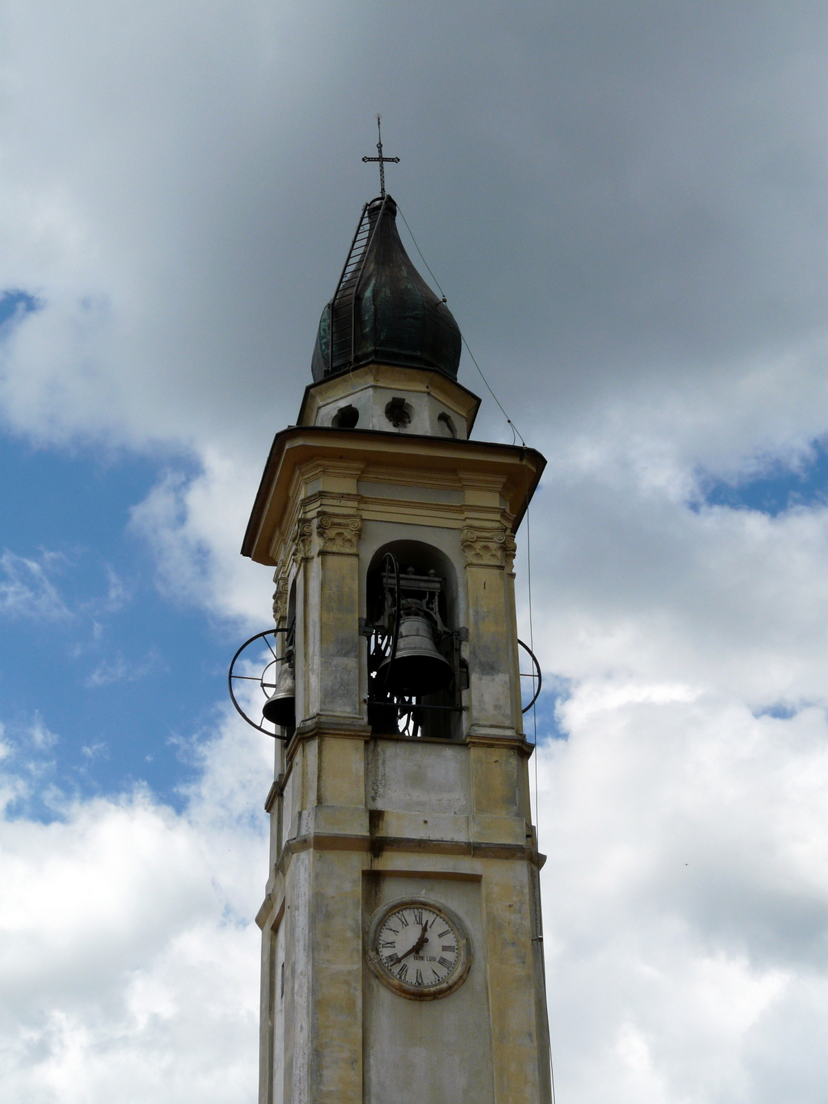 Il campanile della chiesa della Santissima Annunziata, Fascia, Liguria, Italia